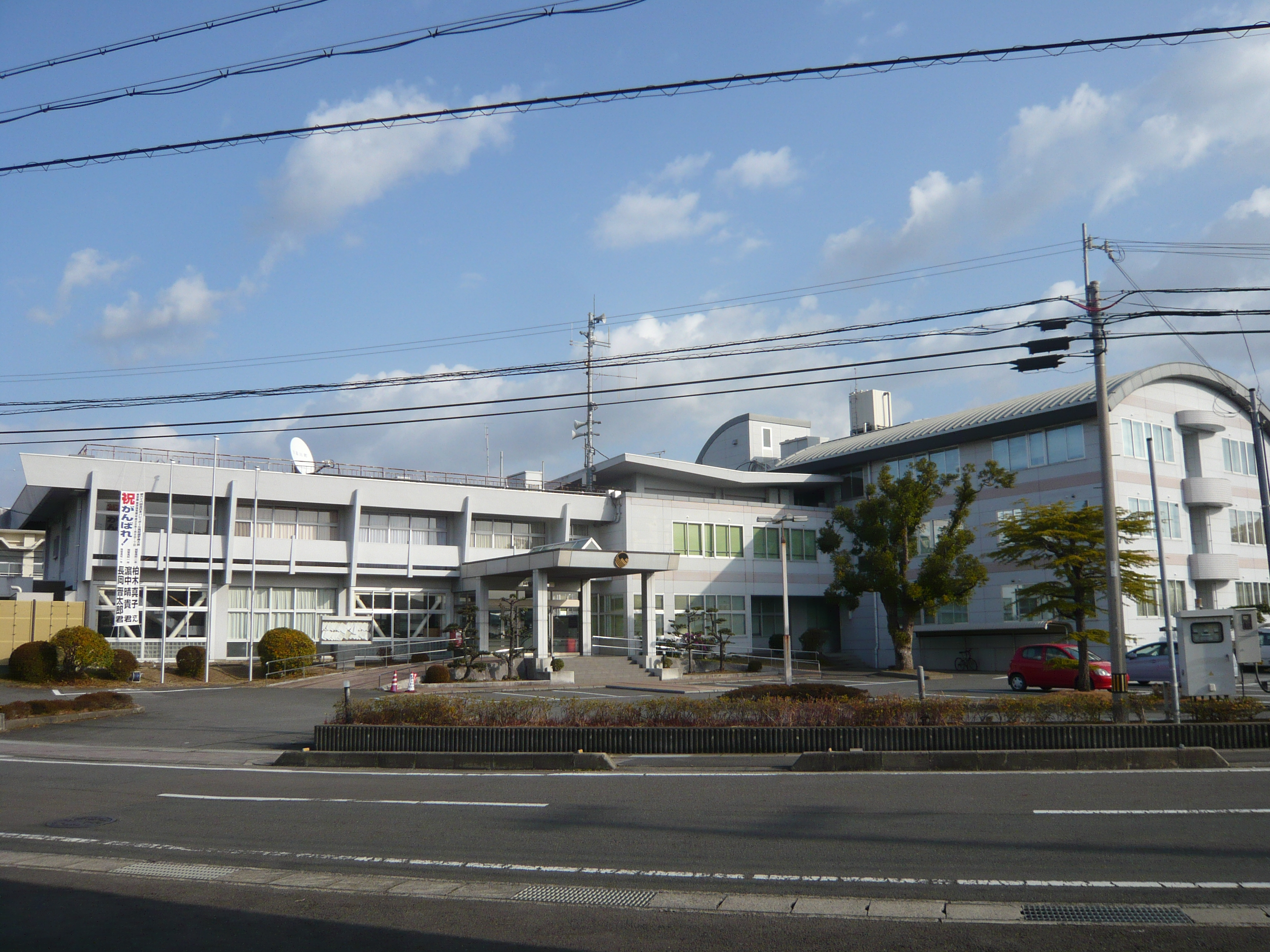 日高川町役場